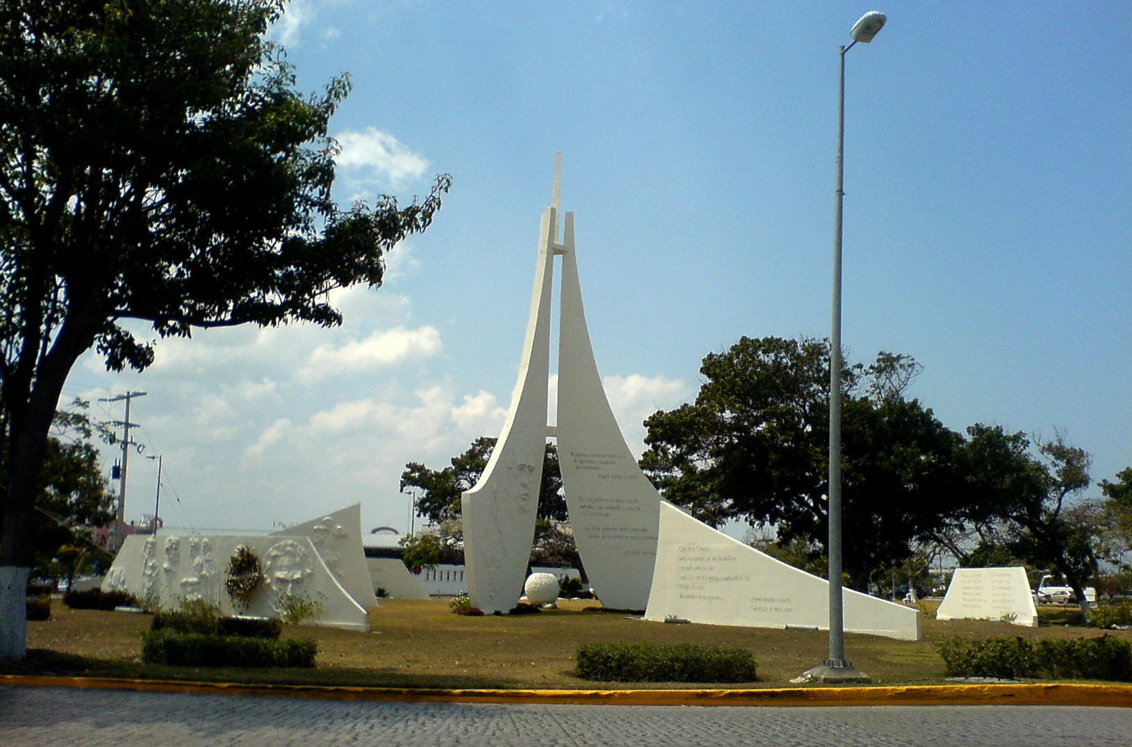 Monumento a los héroes de la independencia, Cancún, QRoo